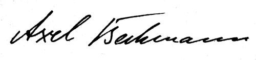 Signatur des deutschen Physiologen Axel Beckmann (1920–1995).